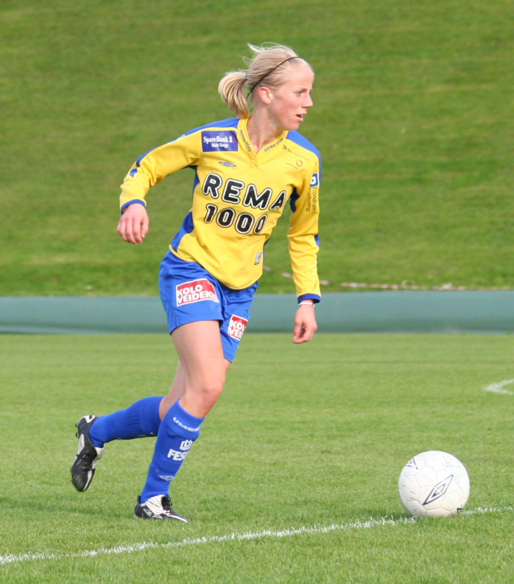 Fotballspilleren Gunhild Følstad